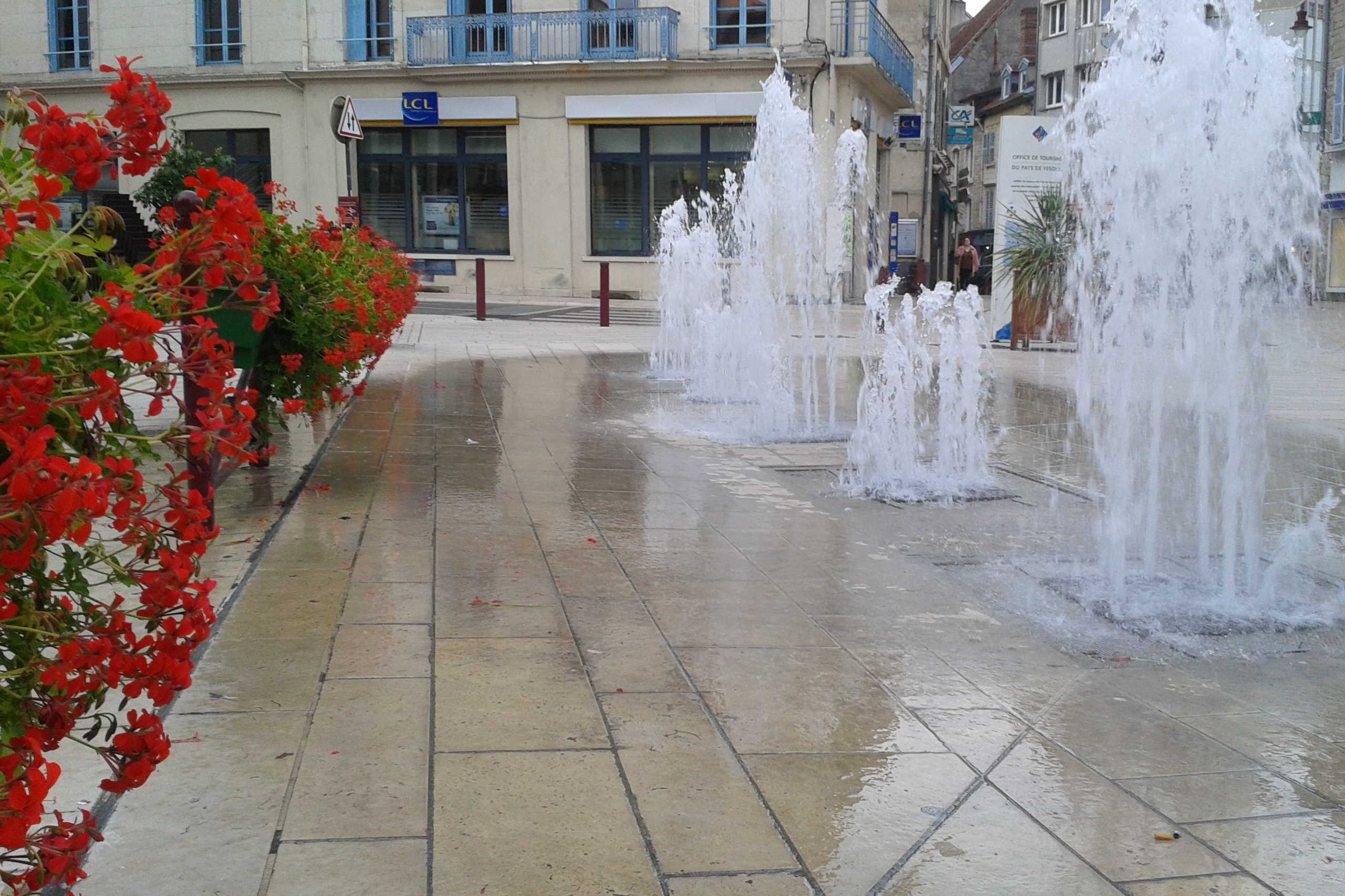 Des jets d'eaux à Vesoul (Haute-Saône, Franche-Comté)